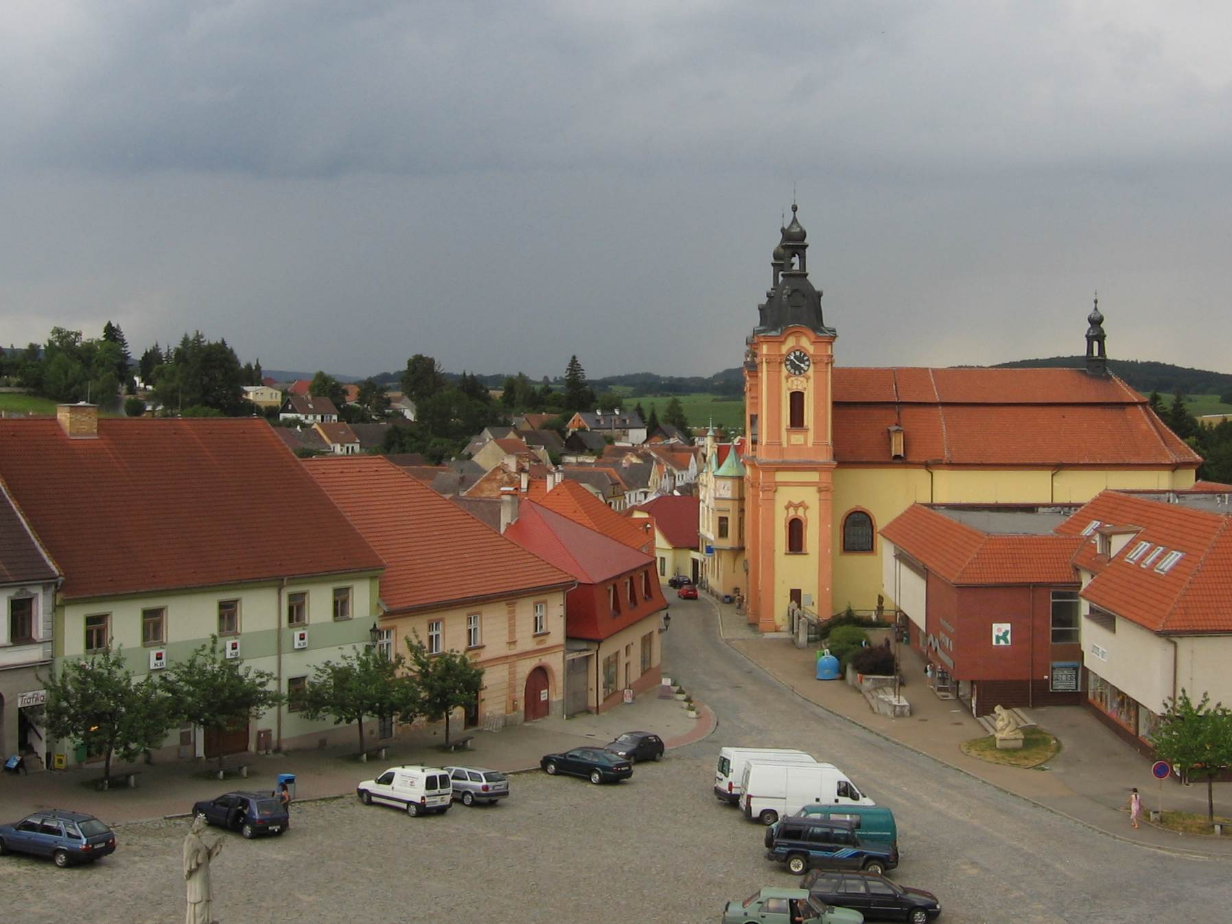 Kostel sv. Jana Nepomuckeho Nepomuk Author: Sarka Vlasakova